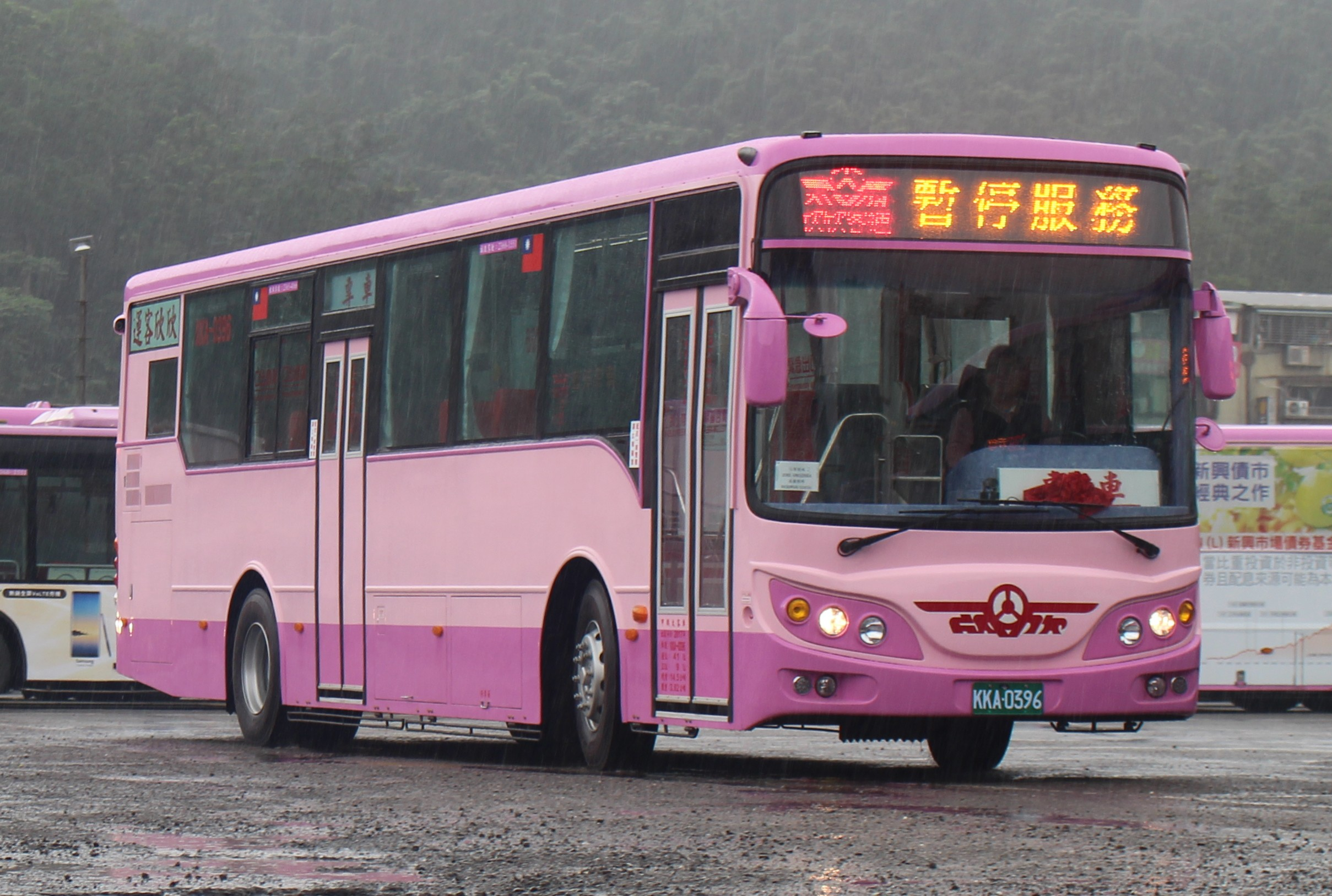 欣欣客運 KKA-0396